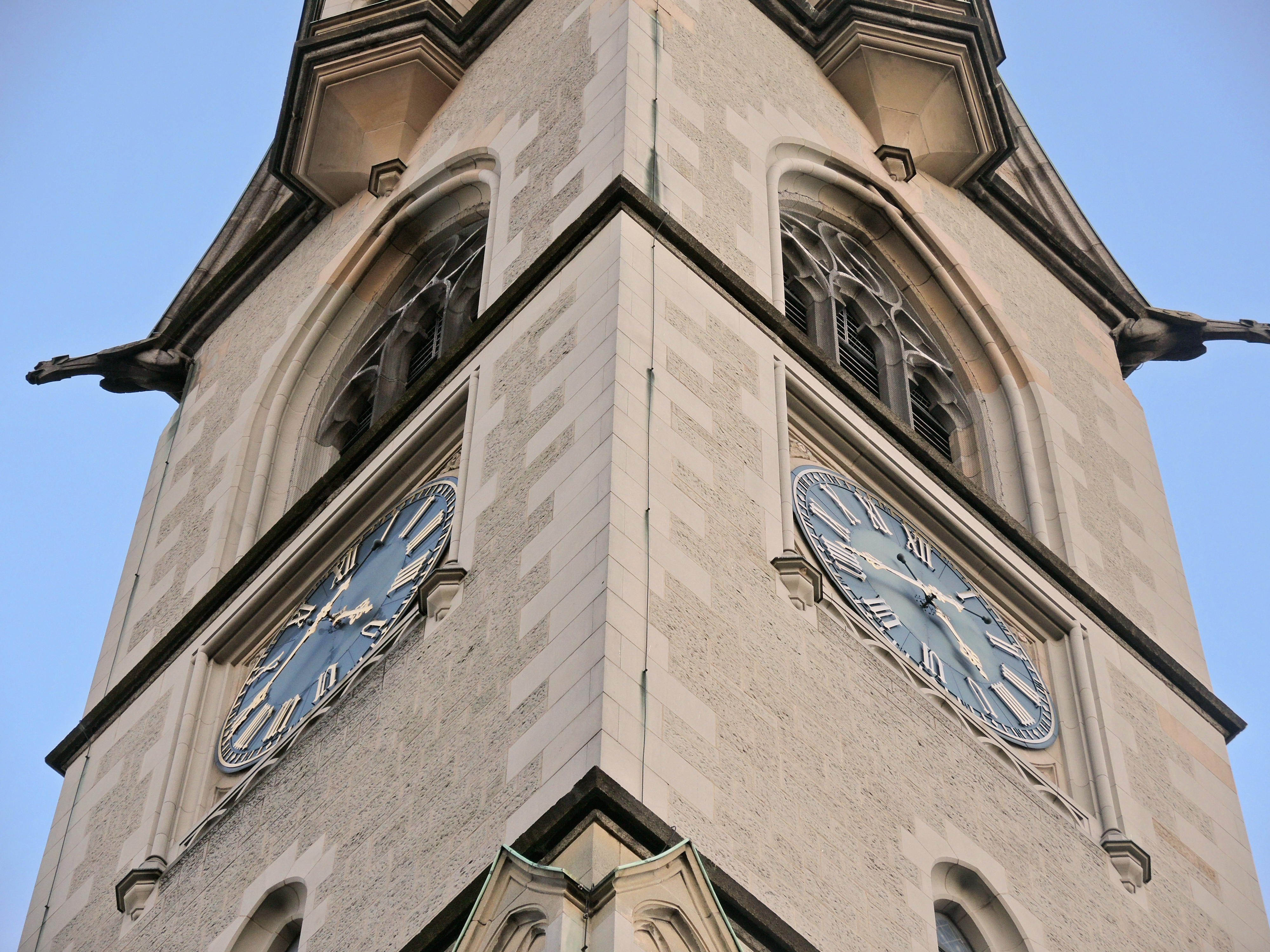 Predigerkirche Zürich